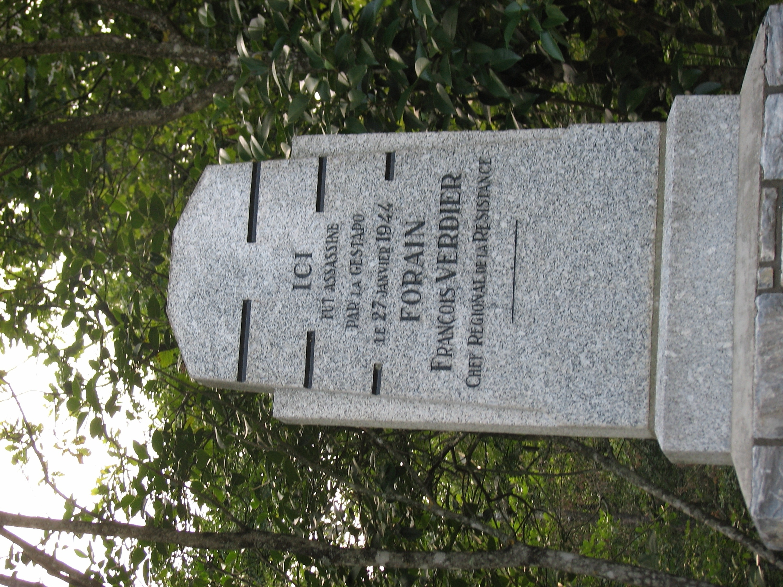 Stèle de François Verdier en forêt de Bouconne (Lasserre, Haute-Garonne, France).